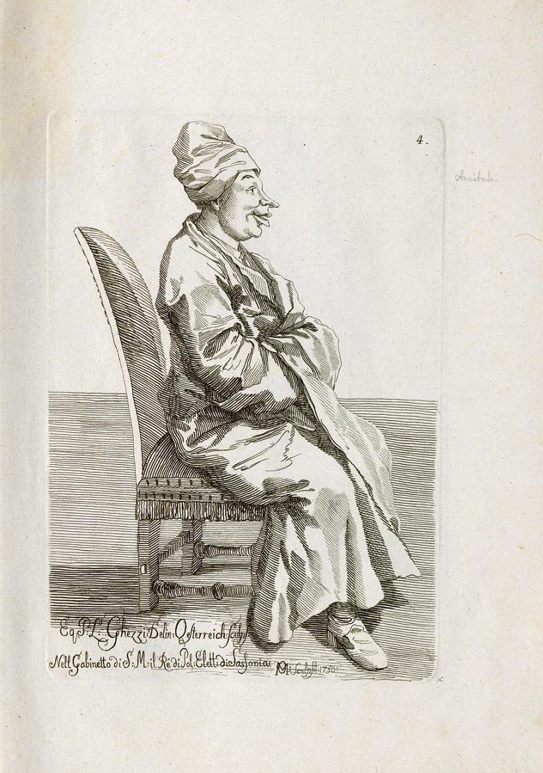 Der Altkastrat Domenico Annibali Zeichnung von Pier Leone Ghezzi (1674–1755) Descriptioncaricaturist and painterDate of birth/death28 June 16746 March 1755Location of birth/deathRomeRomeWork locationFlorenceAuthority control : Q429072 VIAF: 17453553 ISNI: 0000 0001 0844 443X ULAN: 500014963 LCCN: n86091499 NLA: 36048180 WorldCat Originallegende: Il Signor Annibale, in vesta di camera. Virtuoso di Sua Maestà il Rè di Polonia, Elettore di Sassonia DE: Herr Annibale (Domenico Annibali) in Hofkleidung. Kammersänger Seiner Majestät des Königs von Polen und Kurfürsten von Sachsen) EN: Mr Annibale (Domenico Annibali) in court dress. Statutory Court Singer (Kammersänger) of His Majesty the King of Poland and Elector of Saxony) From: Raccolta de vari disegni dell cavalliero Pietro Leone Ghezzi, romano è di Giovann Battista Internari, romano : e di alcuni altri maestri. Potsdam 1766, plate 4